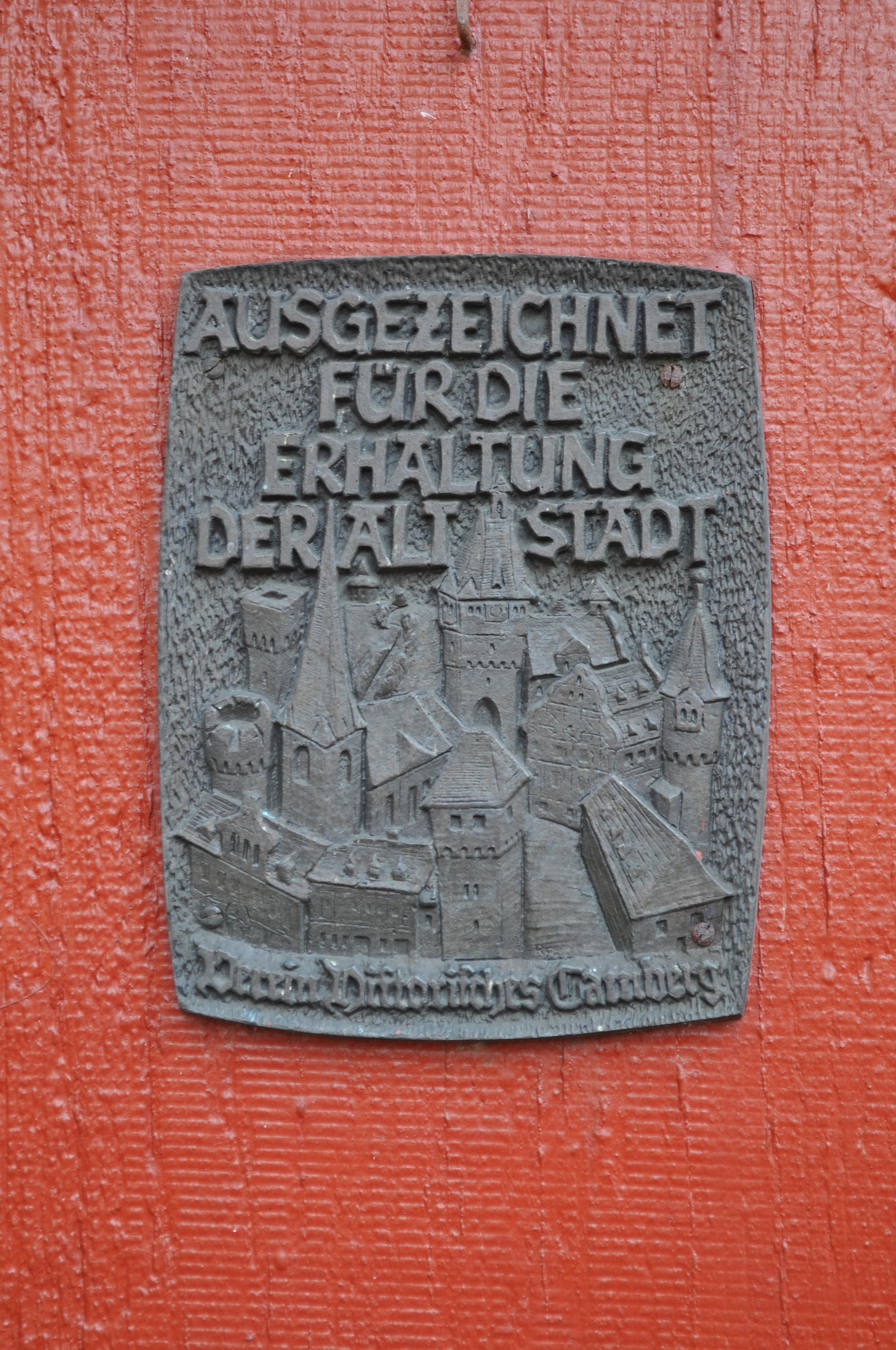 Bad Camberg, Plakette Sanierung, an Strackgasse 8